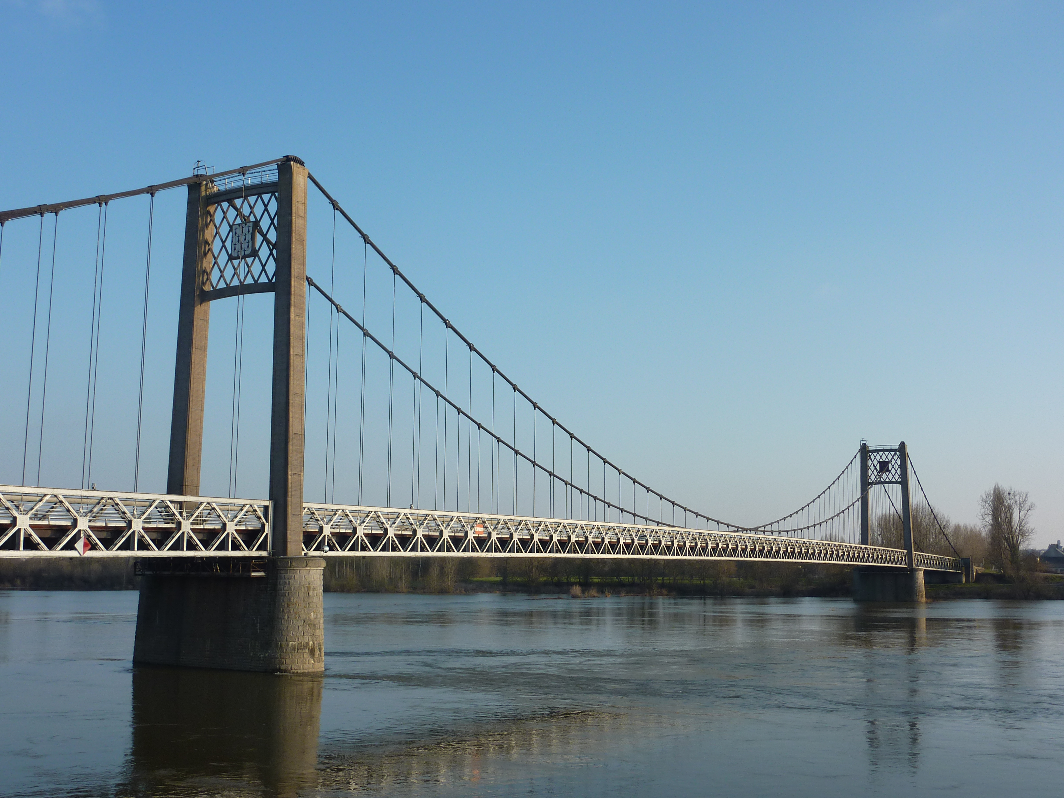 Vue d'ensemble